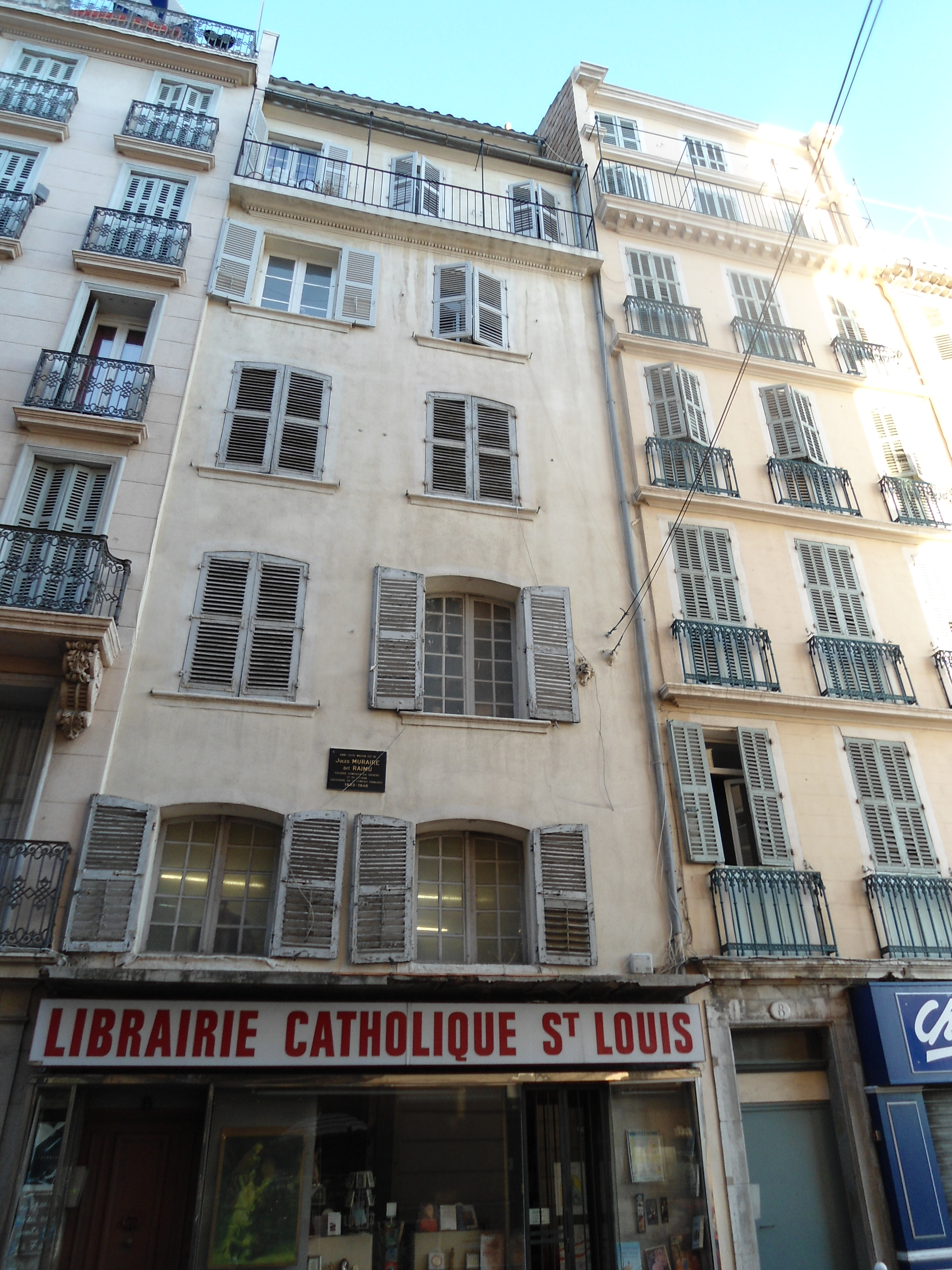 Runa Simi: Jules Murairepa wasin Tulunpi